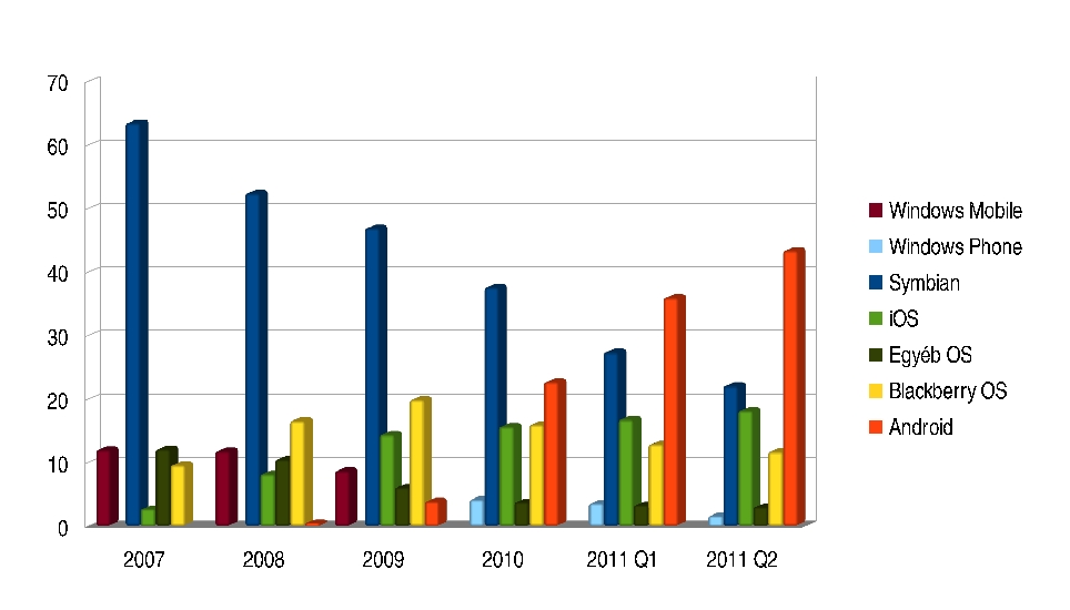 okostelefon piaci részesedés változása 2007-től 2011 Q2-ig